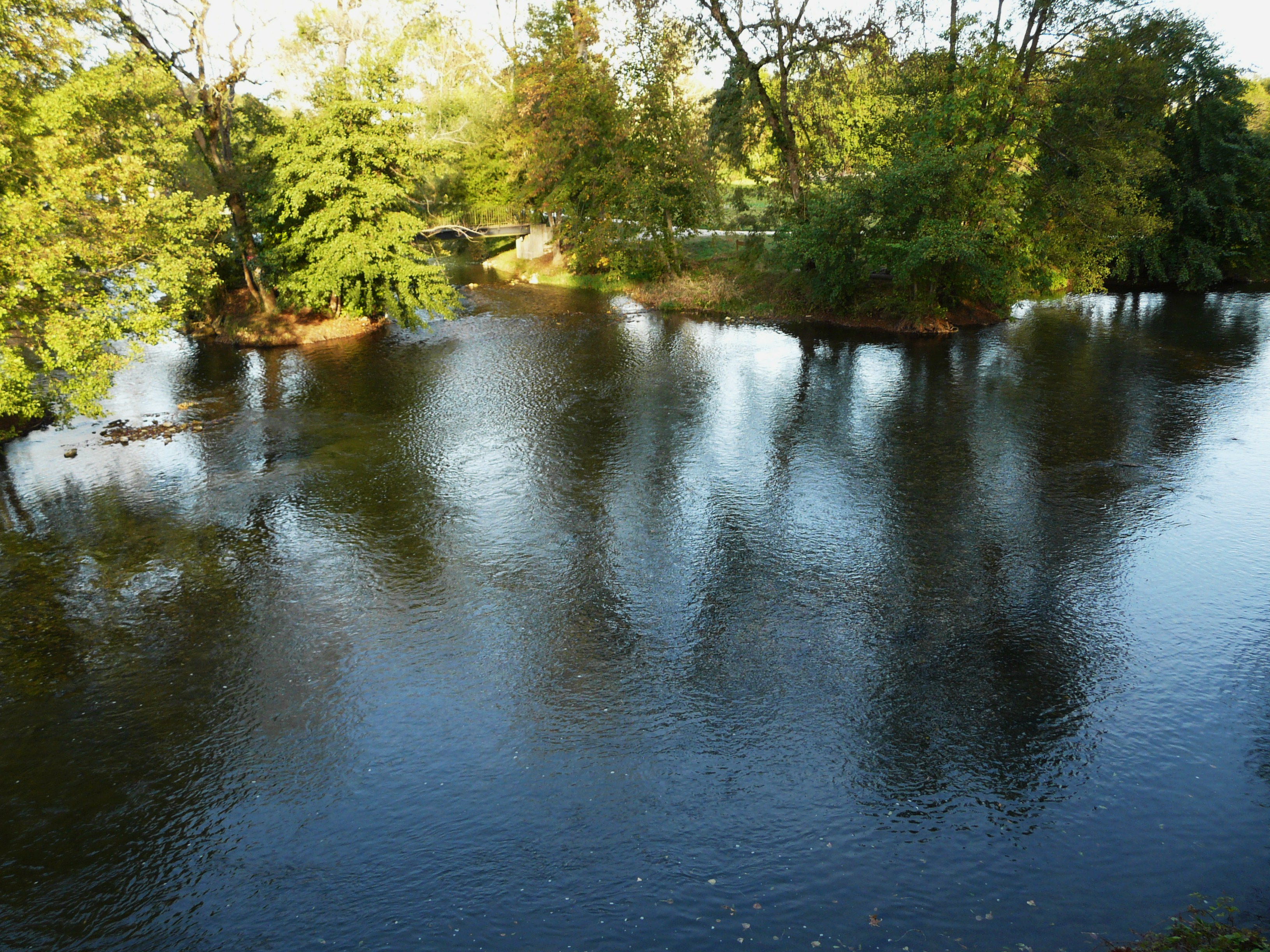 La Dronne au Moulin du Pont, entre Montagrier au second plan, et Tocane-Saint-Apre, Dordogne, France. Vue vers l'amont.